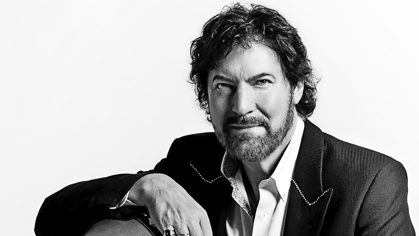 Arne Benoni pressefoto